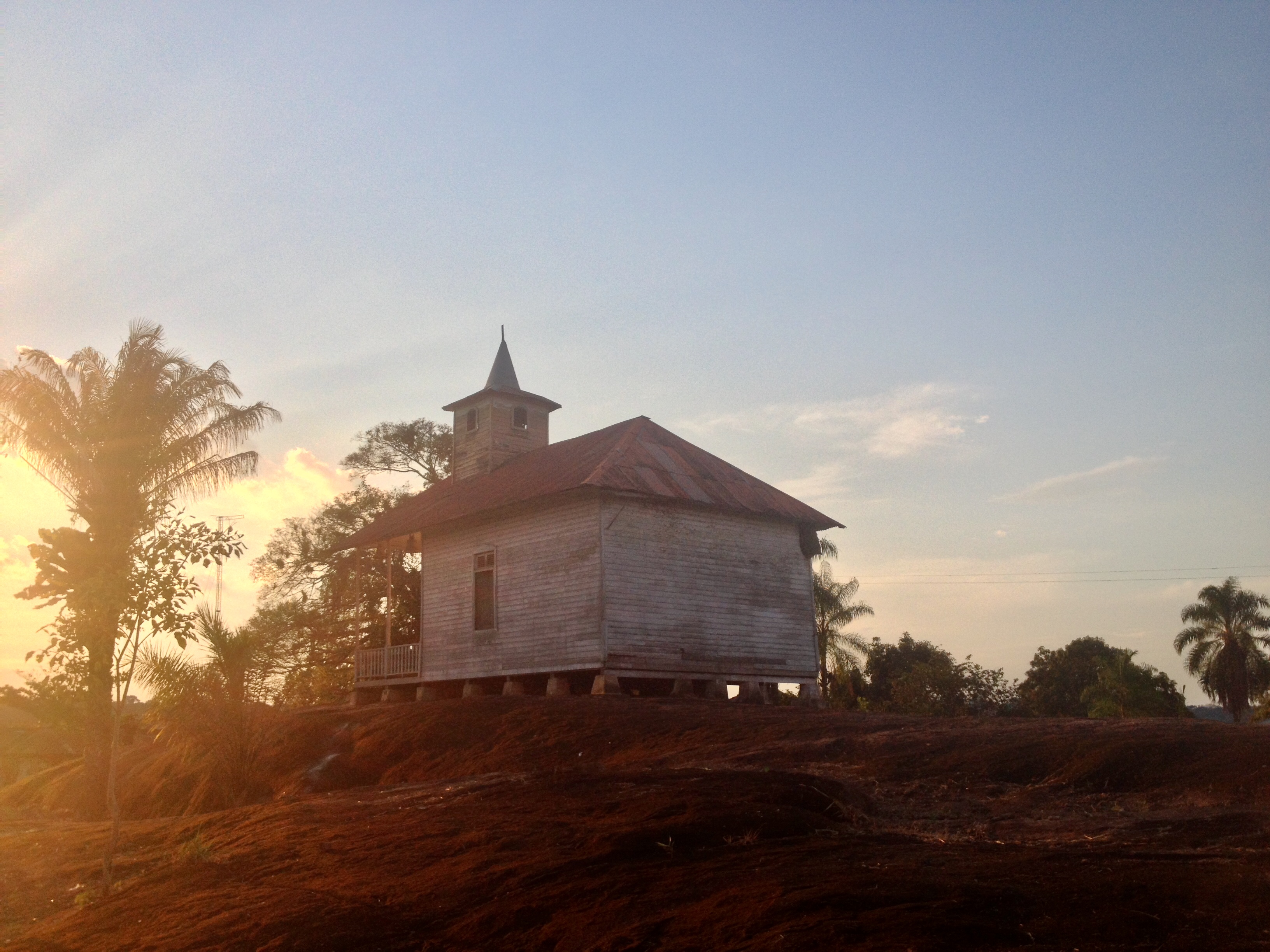 Iglesia de Cachuela Esperanza This medium shows the protected monument with the number N/00-026 in Bolivia.